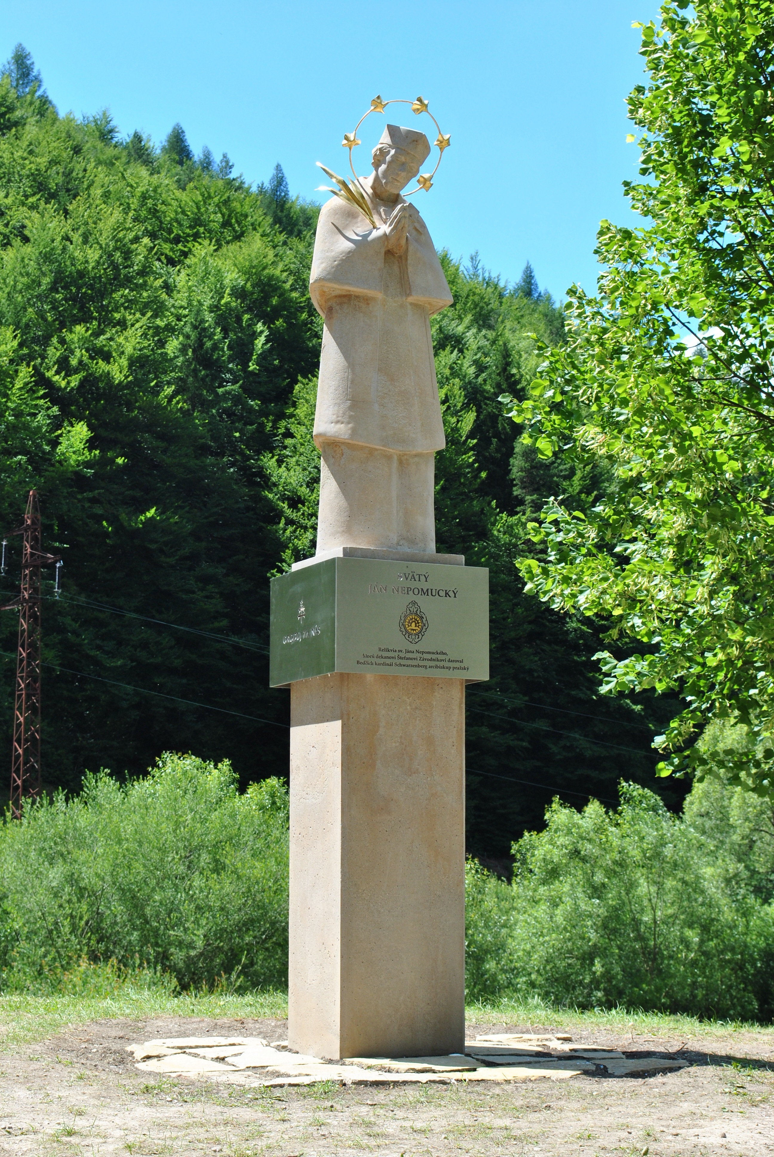 Socha sv. Jána Nepomuckého na Priedhorí, ktorú dali postaviť obyvatelia obce v r. 2012, vytvoril ju Michal Janiga